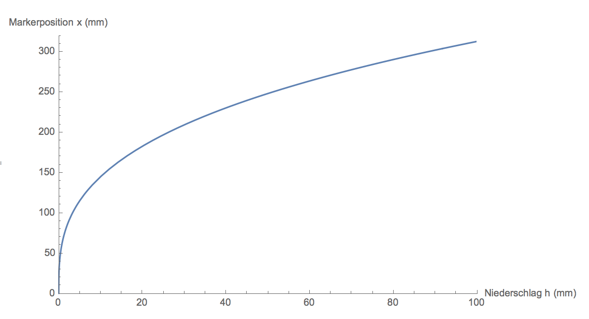 Rainfall Marker Position